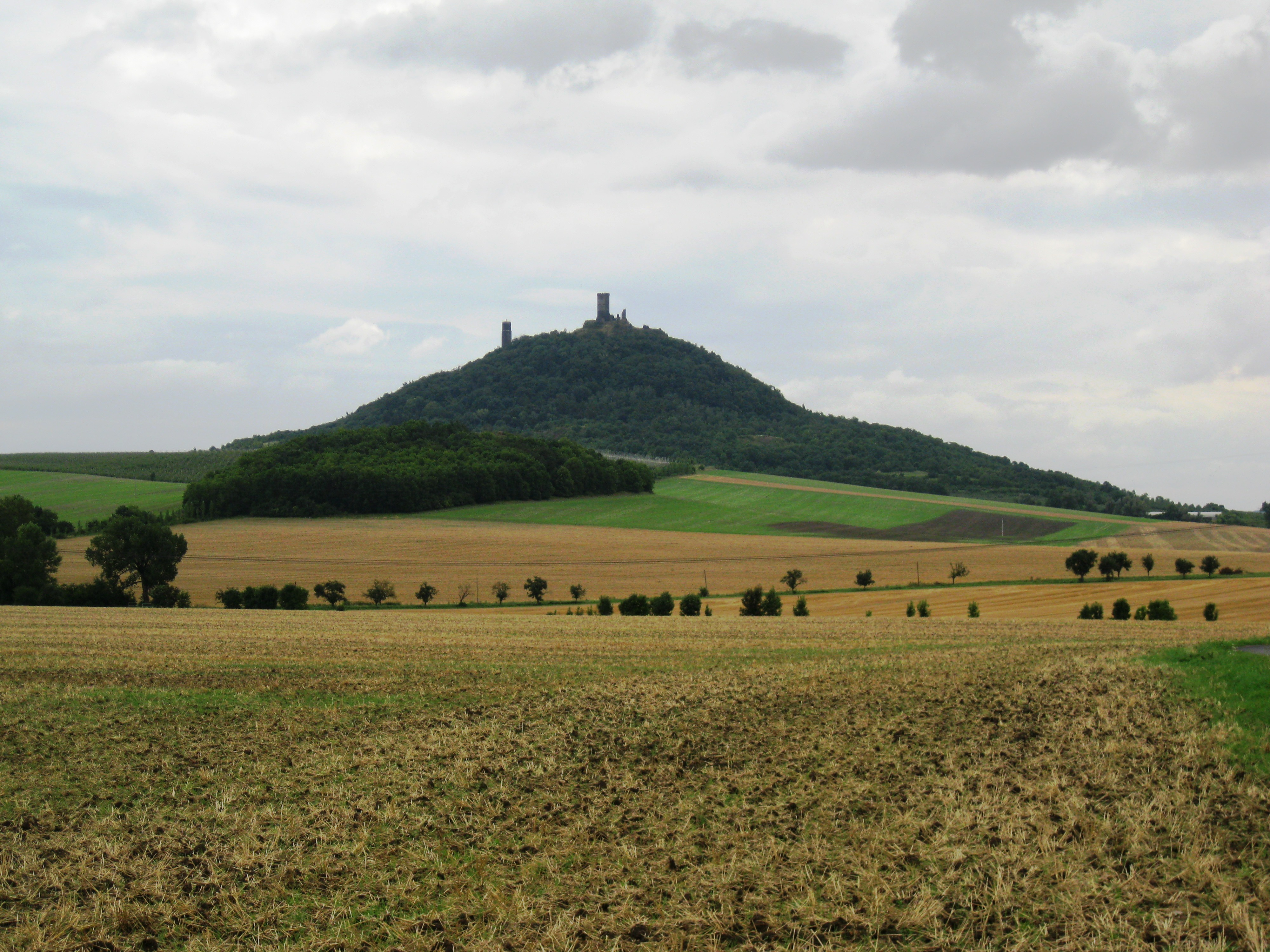 Hrad Házmburk, zřícenina (Klapý), Klapý